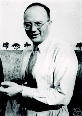 Foto di Friedrich Karl Schmidt